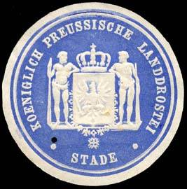 Sealing stamp Title: Koeniglich Preussische Landrostei - Stade Description: blau, weiß, geprägt Place: Stade size: 4 cm